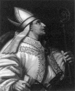 Foto (s/w) eines zeitgenössischen Gemäldes von Dietrich von Horne